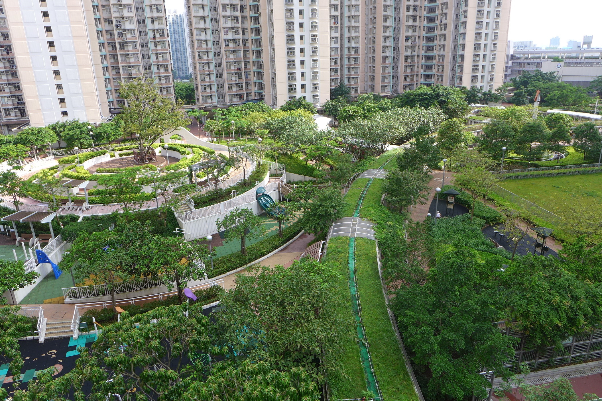 Sau Mau Ping South Estate Garden